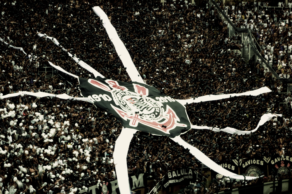 A festa da Fiel torcido no Pacaembu.